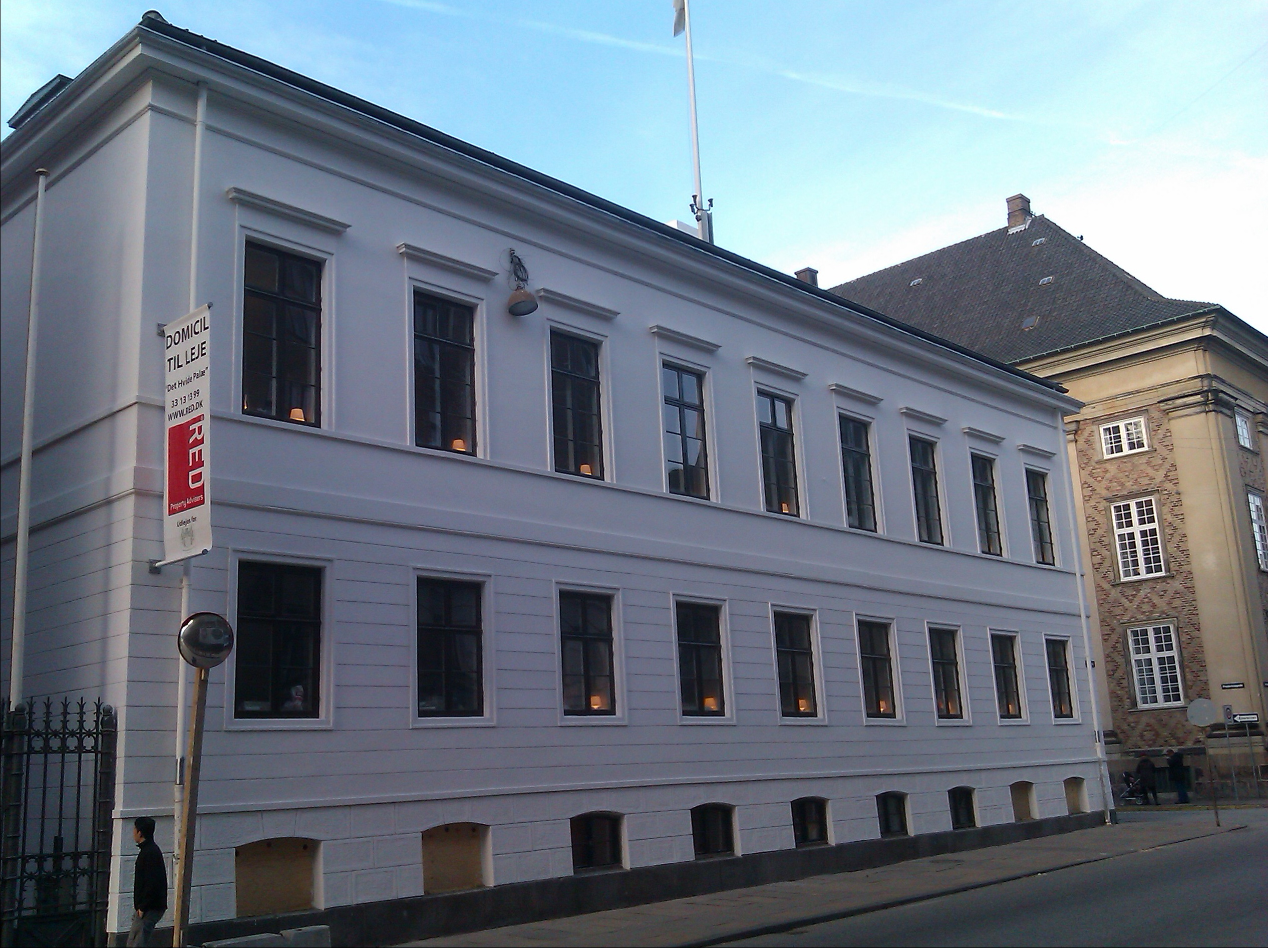 A.N. Hansens Palæ, Fredericiagade 21, København. Opført af Jørgen Hansen Koch i 1835.